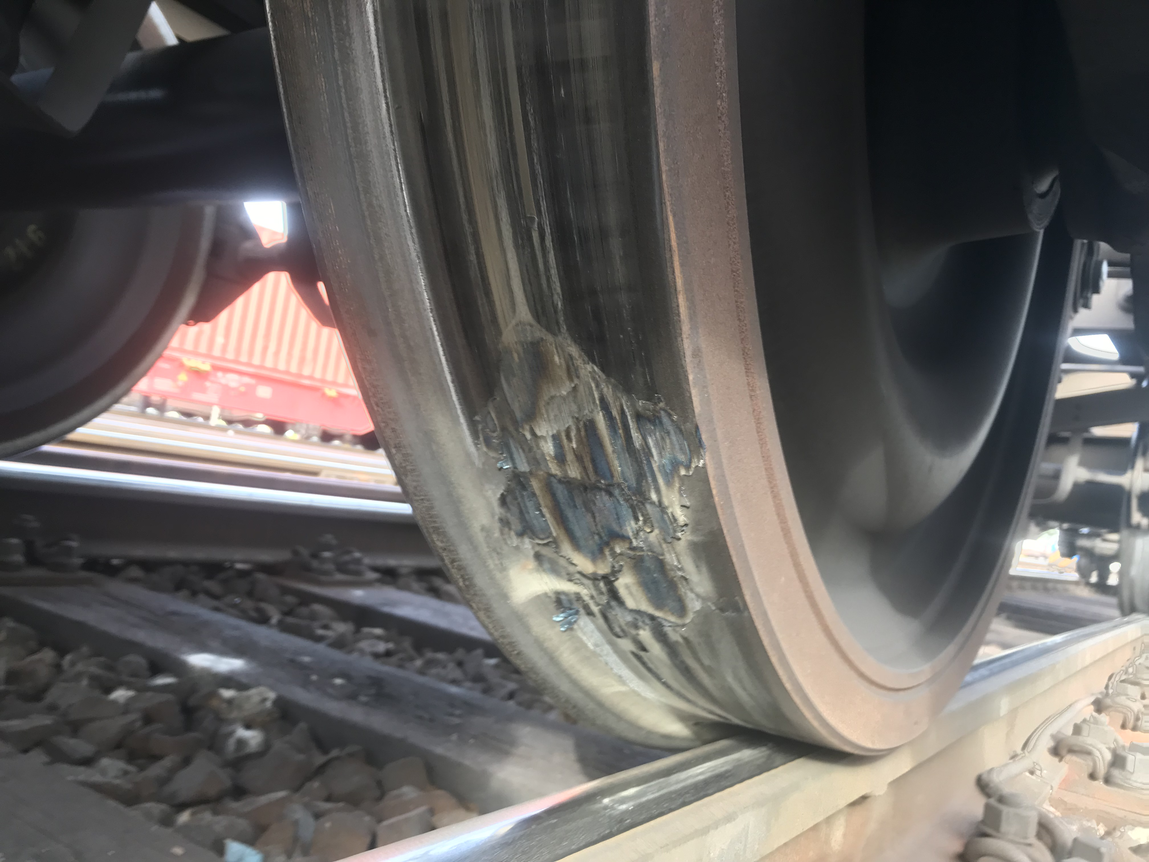 Das ist eine sehr Große Flachstelle mit Aufschweißungen